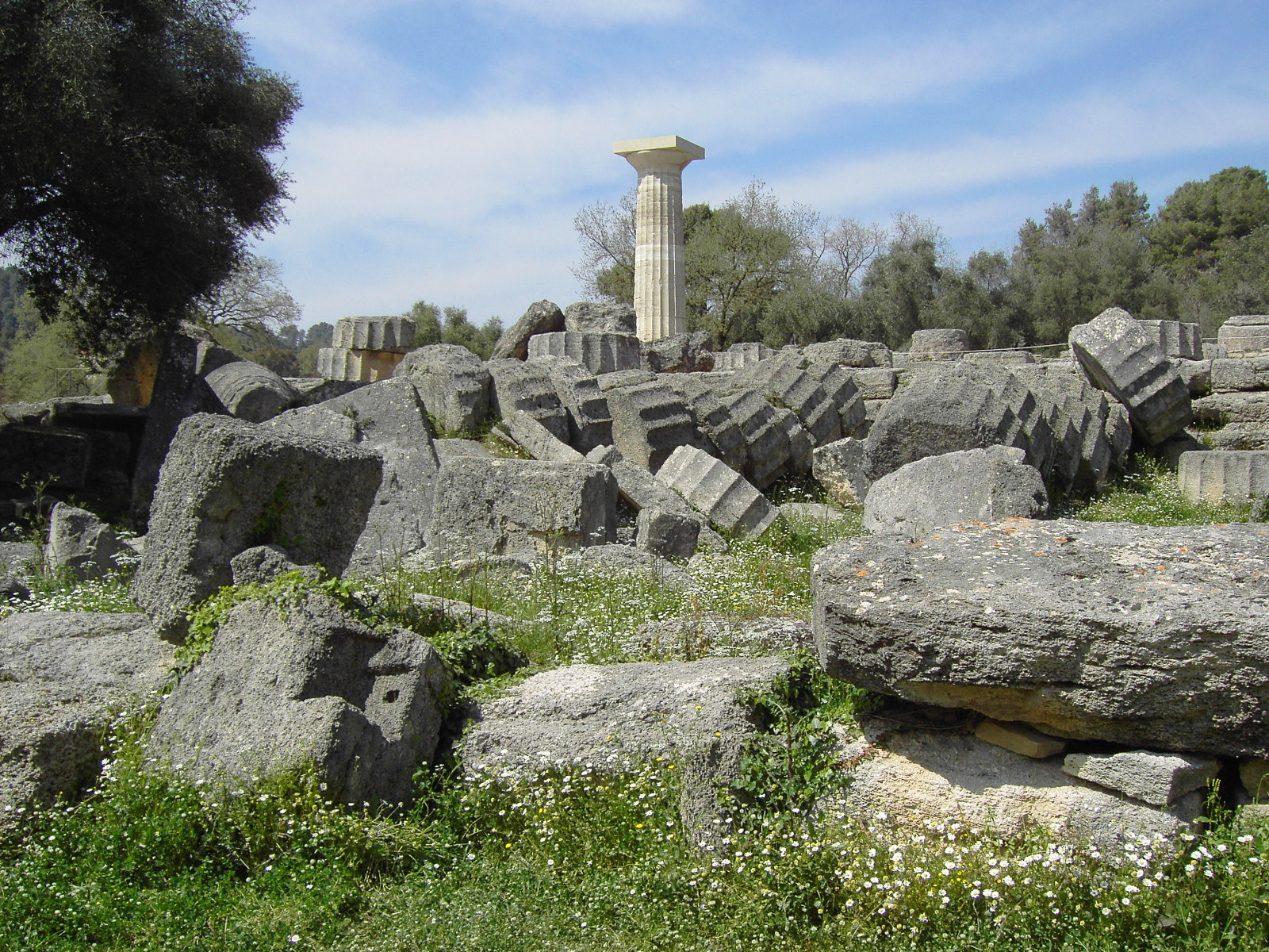 foto Sofie Debognies (april 2005)